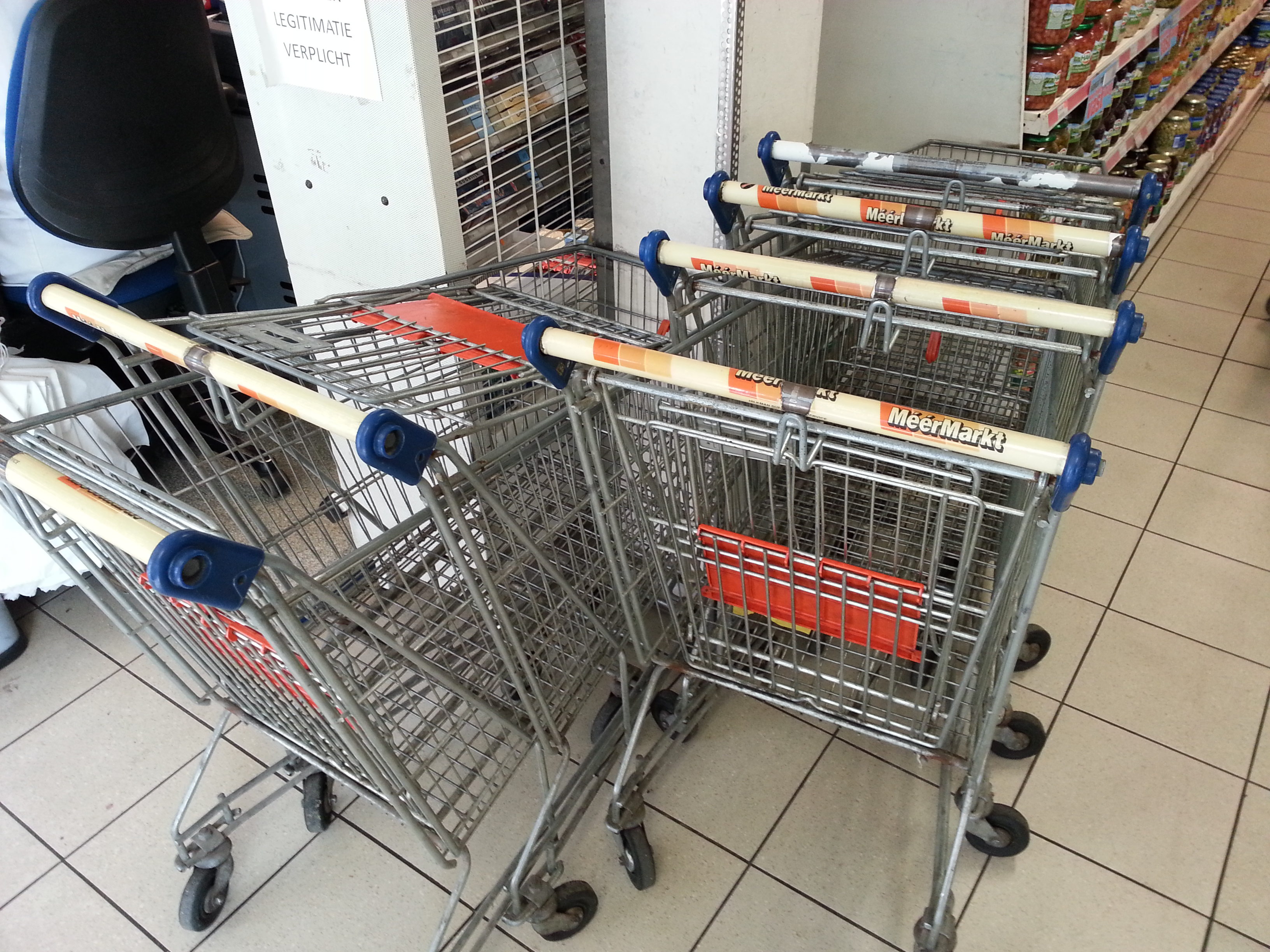 Winkelwagentjes van de voormalige Meermarkt in een supermarkt in Den Haag.